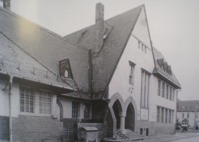 Ľudová_škola_V_Skalici_4